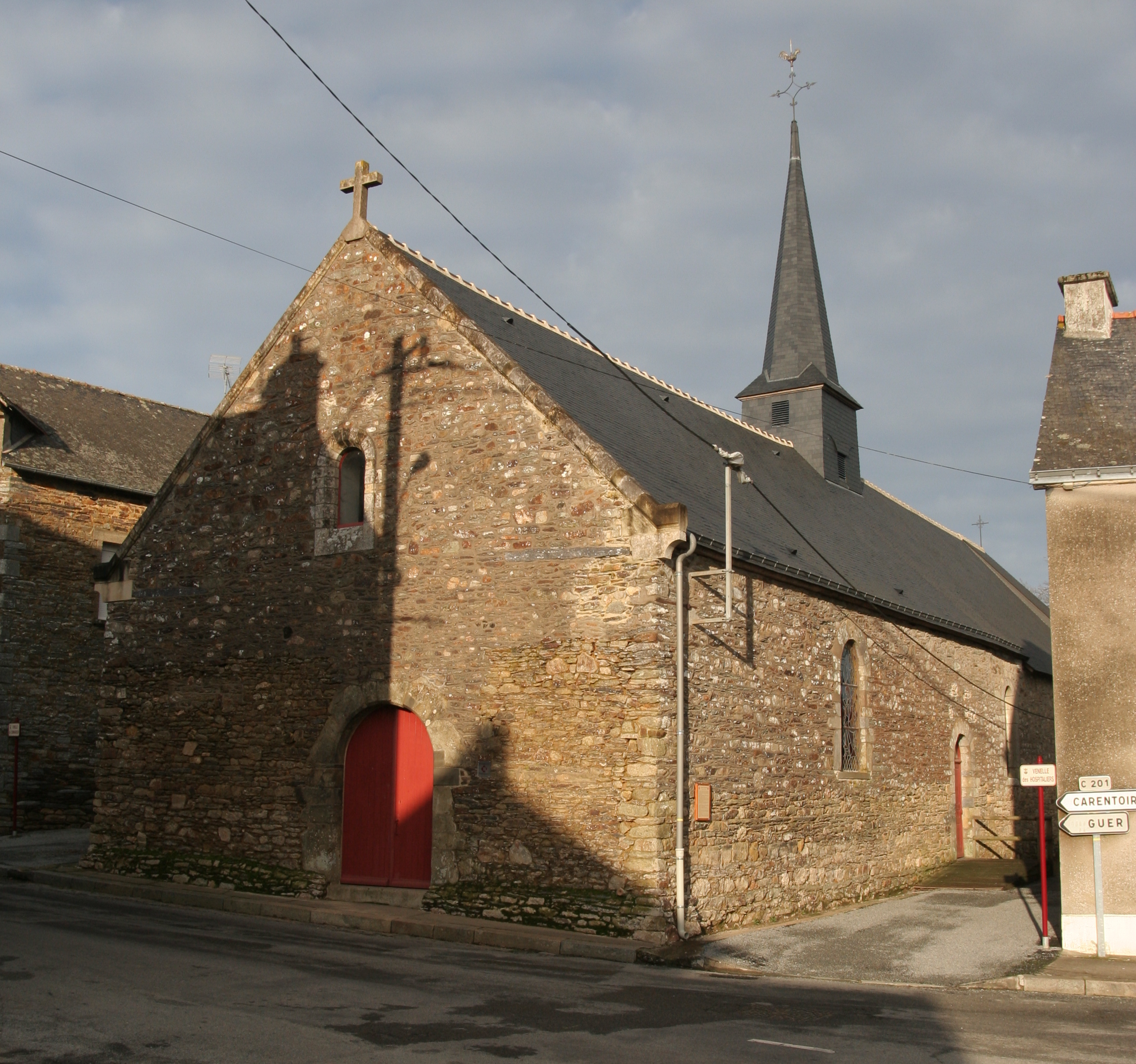 Chapelle Saint-Jean-Baptiste au village du Temple en Carentoir, ancienne chapelle templière.